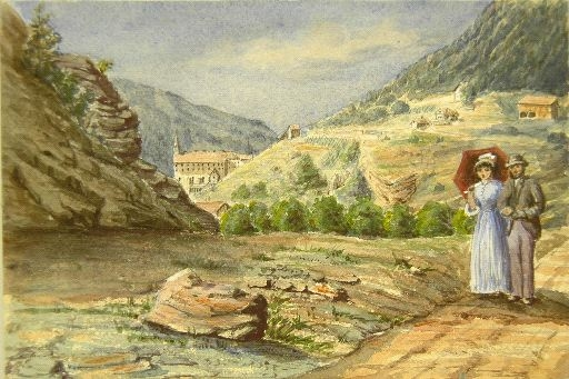 Schanfiggerstrasse